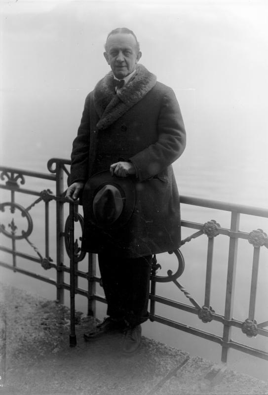 Verbot der Tanks! ein deutscher Antrag in Genf. In der vorbereiteten Abrüstungs-Commission brachte der deutsche Vertreter Graf Bernstorff einen Antrag ein, dass das Verbot der schweren Angriffswaffen bezweckt. Die Staaten sollen sich verpflichten, dieses Kriegsmaterial zu zerstören und hierüber dem Generalsekretär des Völkerbundes Mitteilung machen. Der deutsche Vertreter der Abrüstungs-Commission Graf Bernsdorff in Genf.